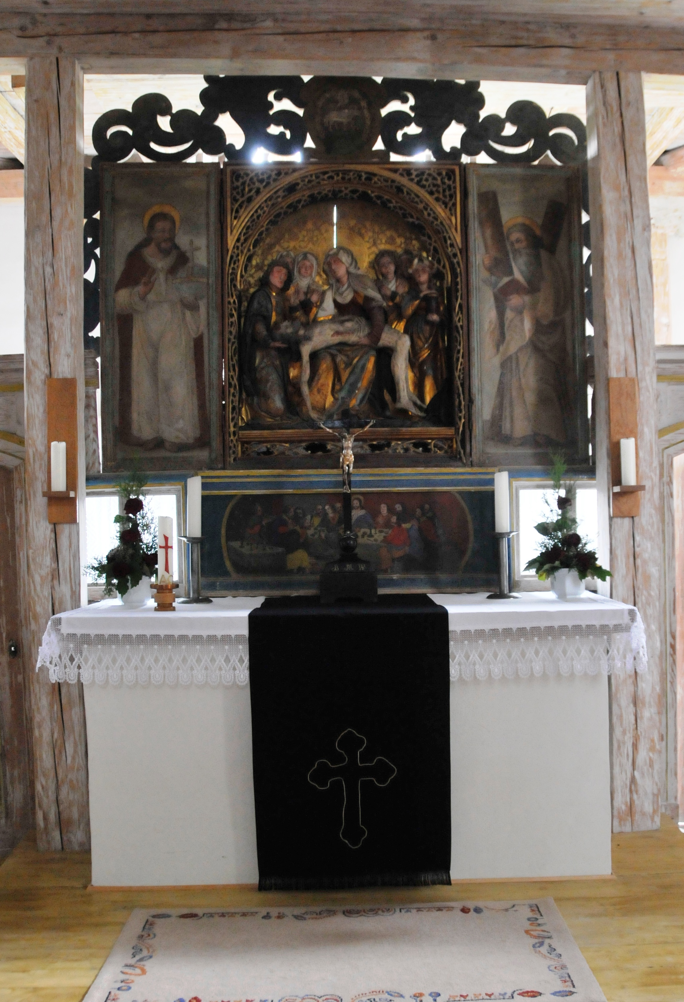 Ermstedt, Kirche, Altar